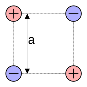 simple Quadrupol